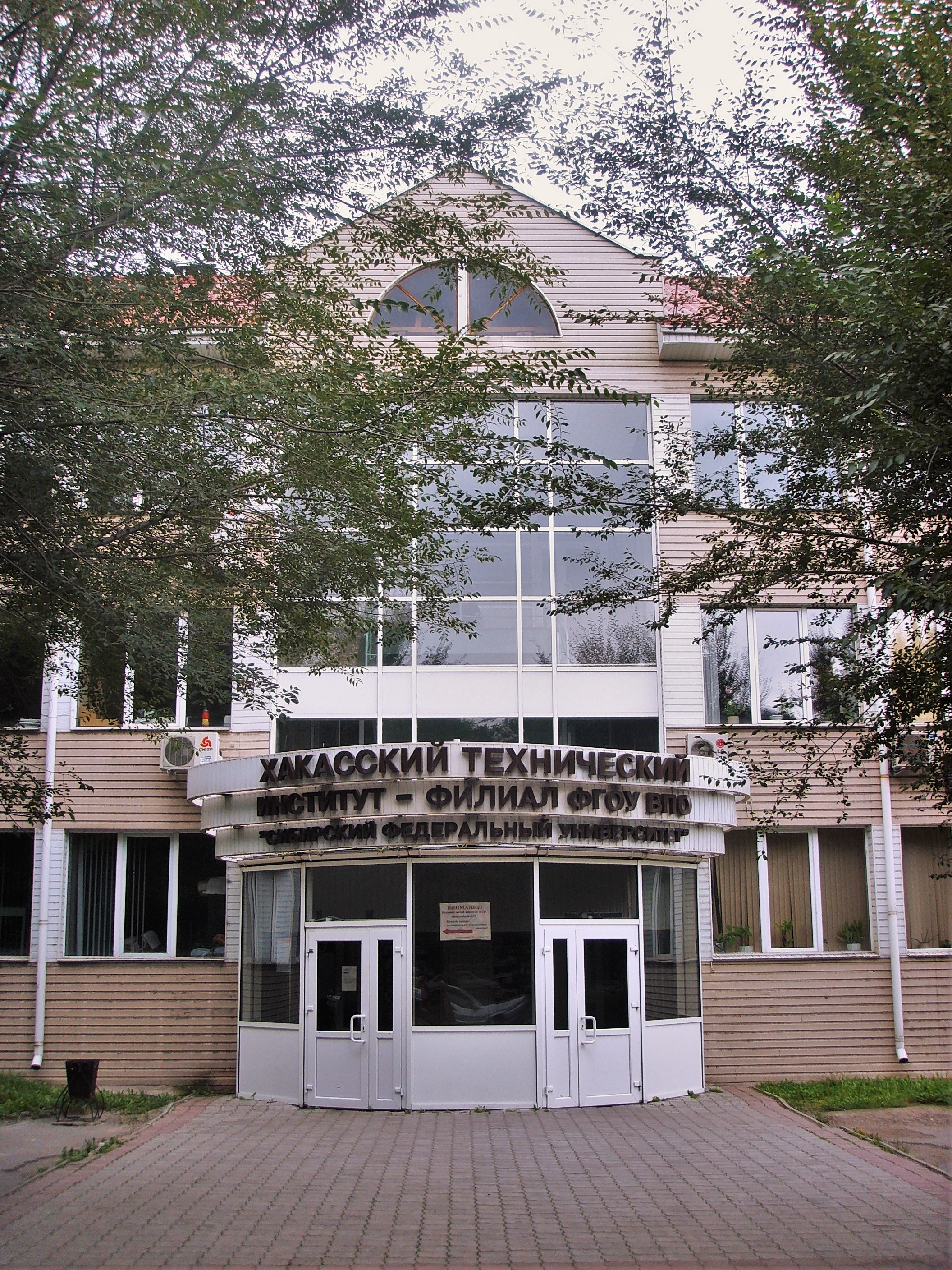 Корпус "А" Хакасского технического института